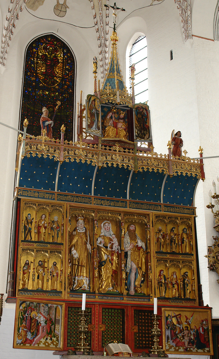 Dom zu Århus: Flügelaltar von Bernt Notke (Lübeck). Ostern 1479 eingeweiht. Restauriert 1975–1981 beim Dänischen Nationalmuseum